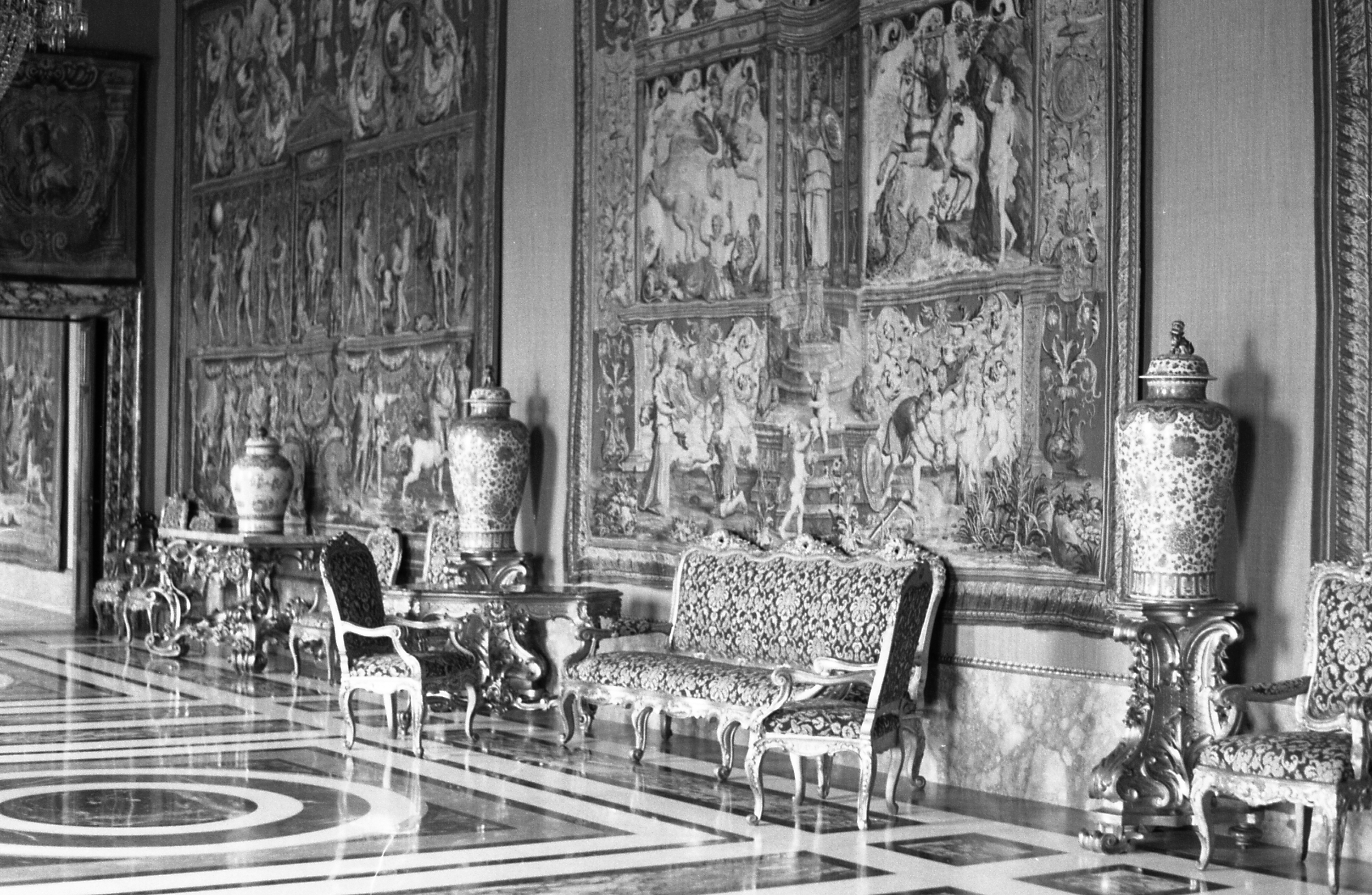 Servizio fotografico : Roma, 1962 / Paolo Monti. - Strisce: 3, Fotogrammi complessivi: 13 : Negativo b/n, gelatina bromuro d'argento/ pellicola ; 35 mm. - ((I fotogrammi hanno una doppia numerazione. - Sul portanegativi: Pentax Agfa 21. - Monti segnala sul portanegativi, sia all'esterno che all'interno, i fotogrammi realizzti con Agfa 21, lettera A e Agfa 25 lettera B. - Occasione: Documentazione del Palazzo del Quirinale per la sig. ra Chiara Briganti. - Fonte: Agenda di Paolo Monti: Foto Leica 1 / 1-51 verde, 1-110 nera (1958-1963), presso Archivio Paolo Monti